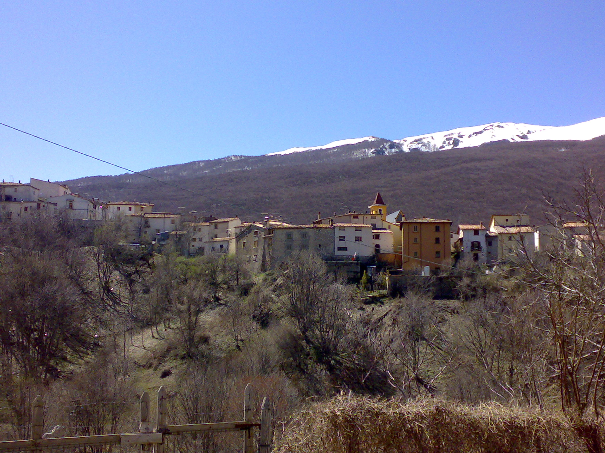 Scattata da me